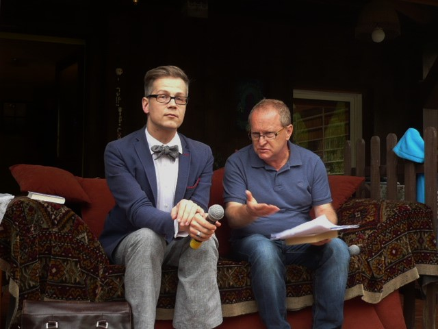 Jacek Dehnel i Karol Maliszewski na Festiwalu Góry Literatury w Krajanowie